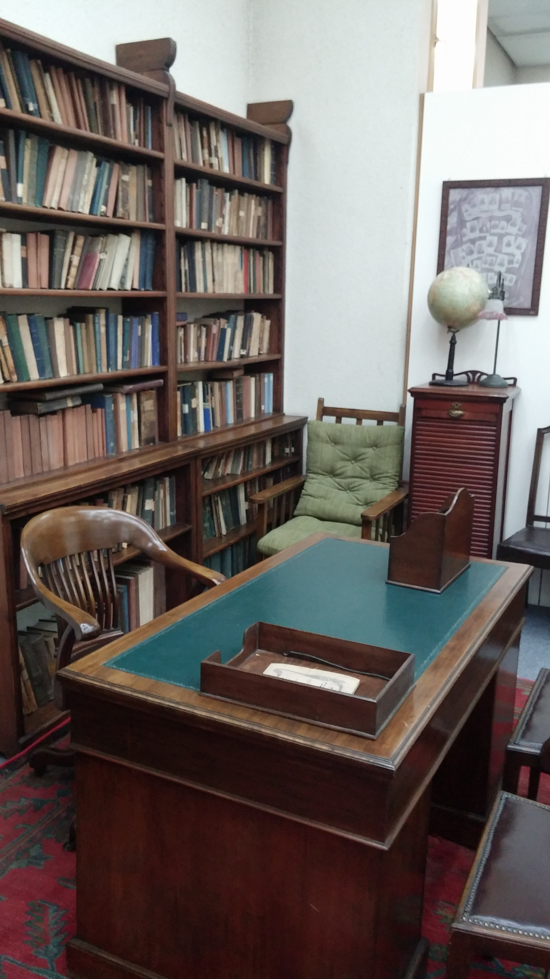 שולחנו האישי של אחד העם, בחדר על שמו בספריית שער ציון בית אריאלה בתל אביב